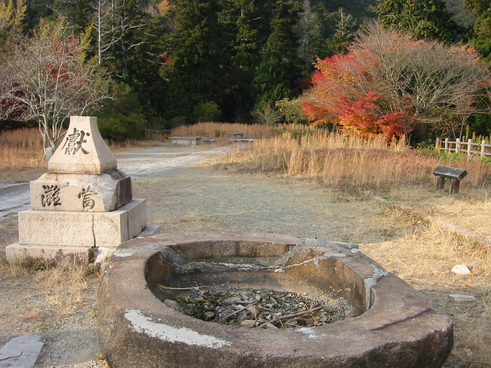 神戸 旧天上寺跡 摩耶山史跡公園